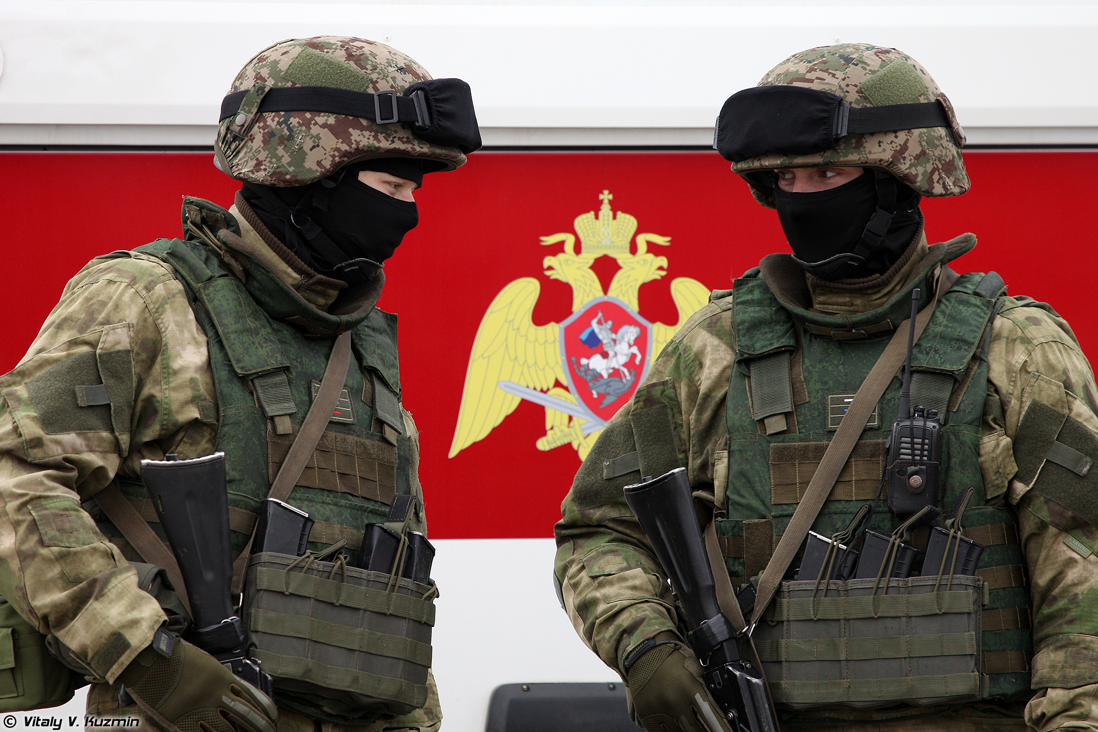 Росгвардия (National Guards Troops)